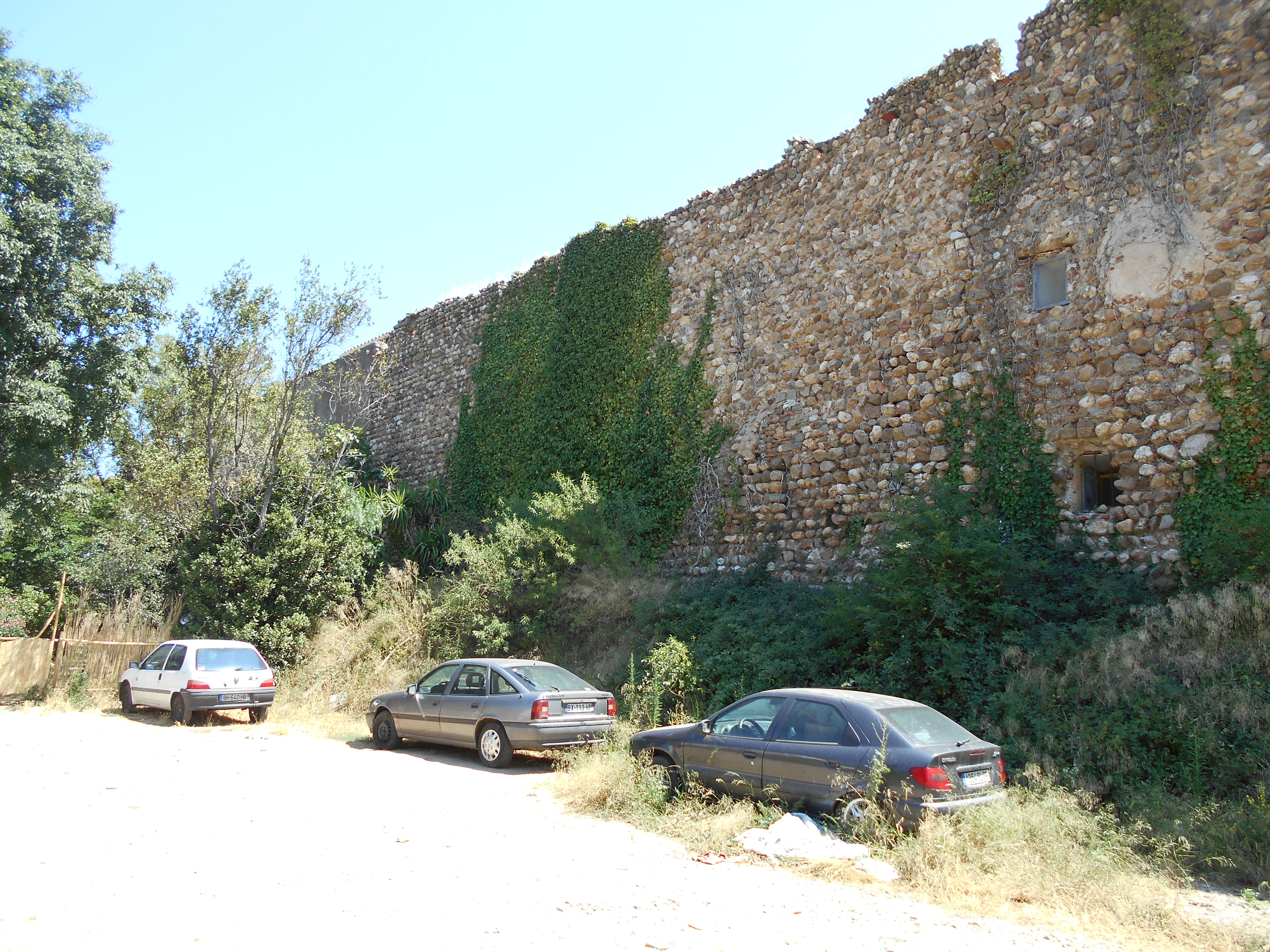 Muralles del Castell